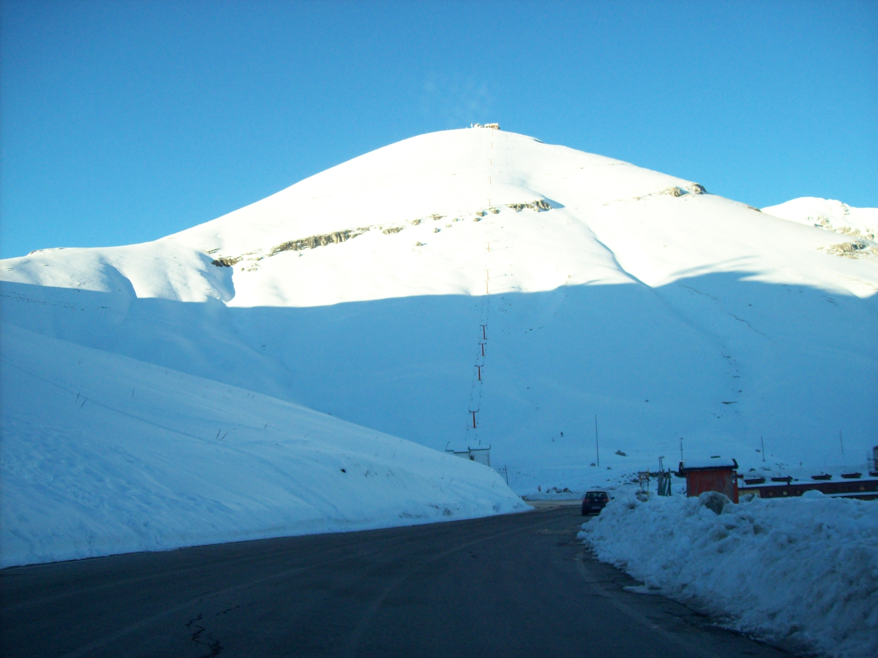 La strada provinciale 10 Turistica del Terminillo d'inverno in località Rialto; sullo sfondo il monte Terminilletto con il rifugio Massimo Rinaldi e la seggiovia dismessa che porta sulla cima